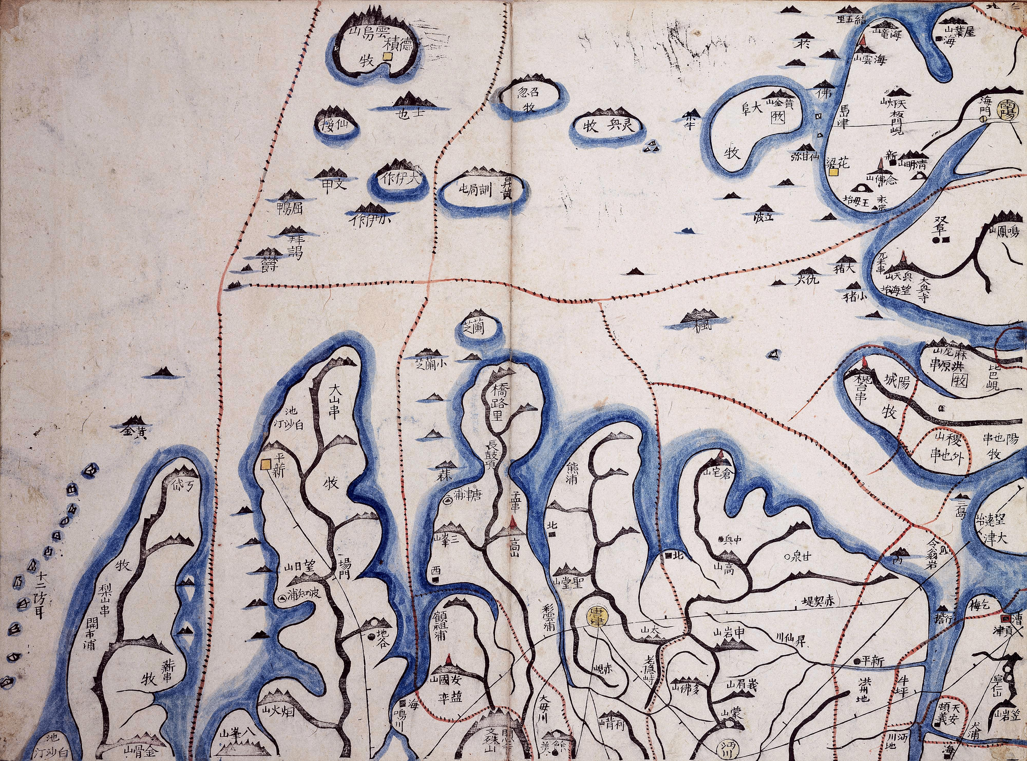 대동여지도